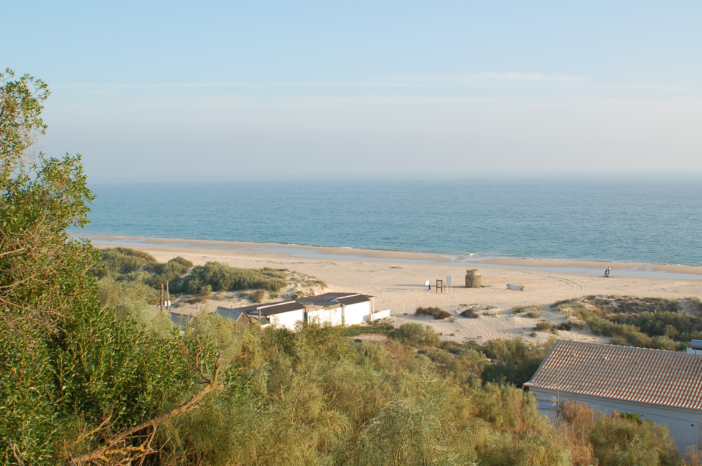 Praia Verde, Algarve, Portugal